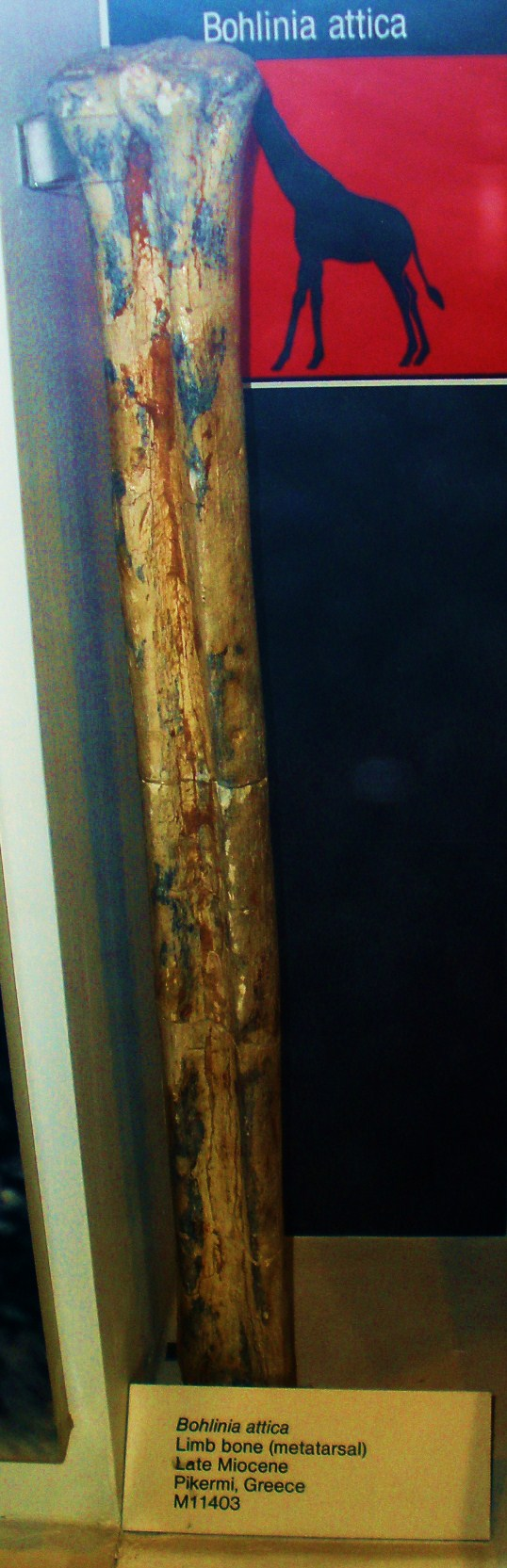 Fossil of Bohlinia, an extinct mammal -- Took the photo at Natural History Museum, London